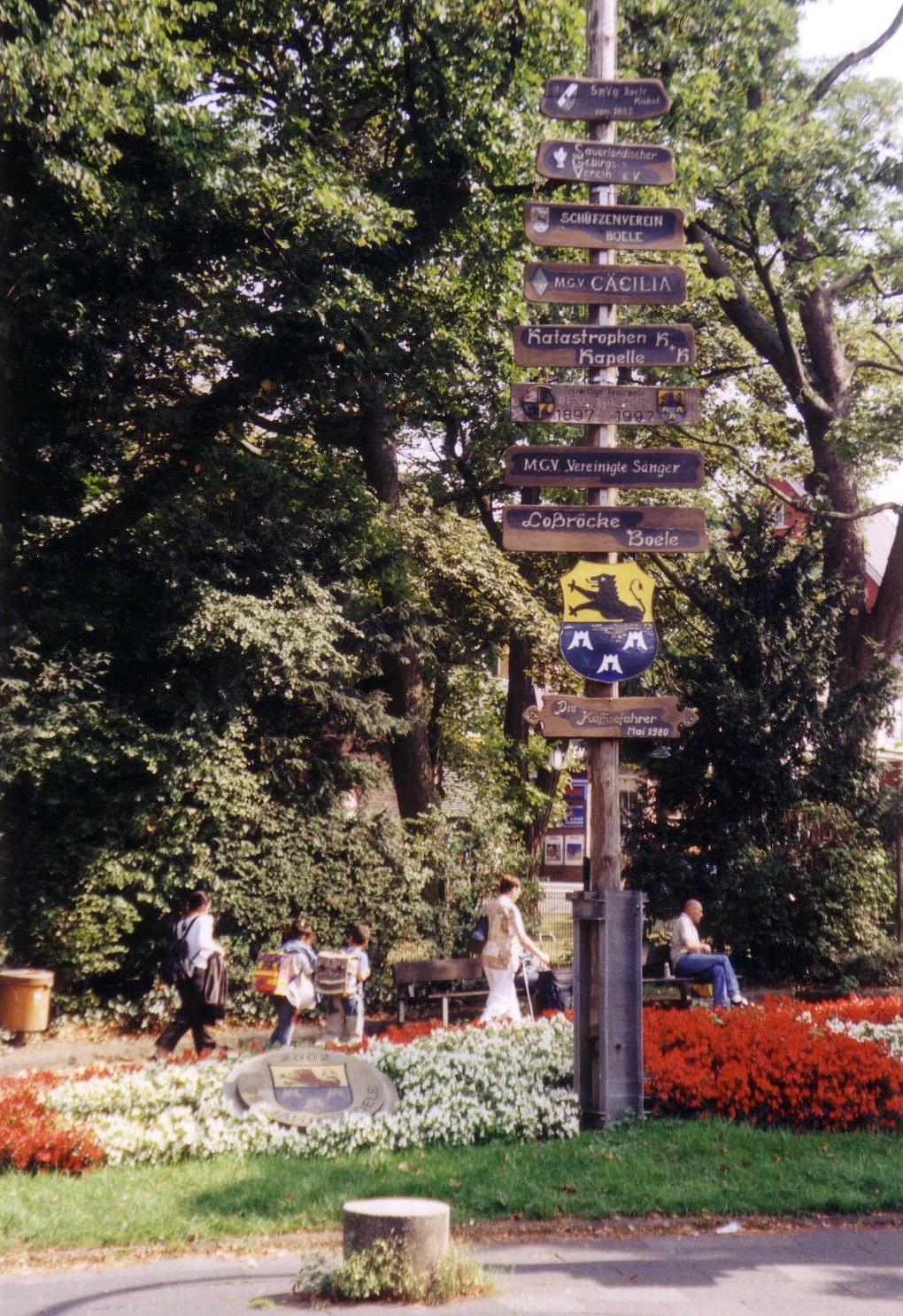 Vereins-/Gildenbaum im Zentrum von Hagen-Boele mit Gedenkstein zur 750-Jahrfeier (von September 2002) Fotograf: Hannes Luczinski, 2005 Quelle: selbst gemacht